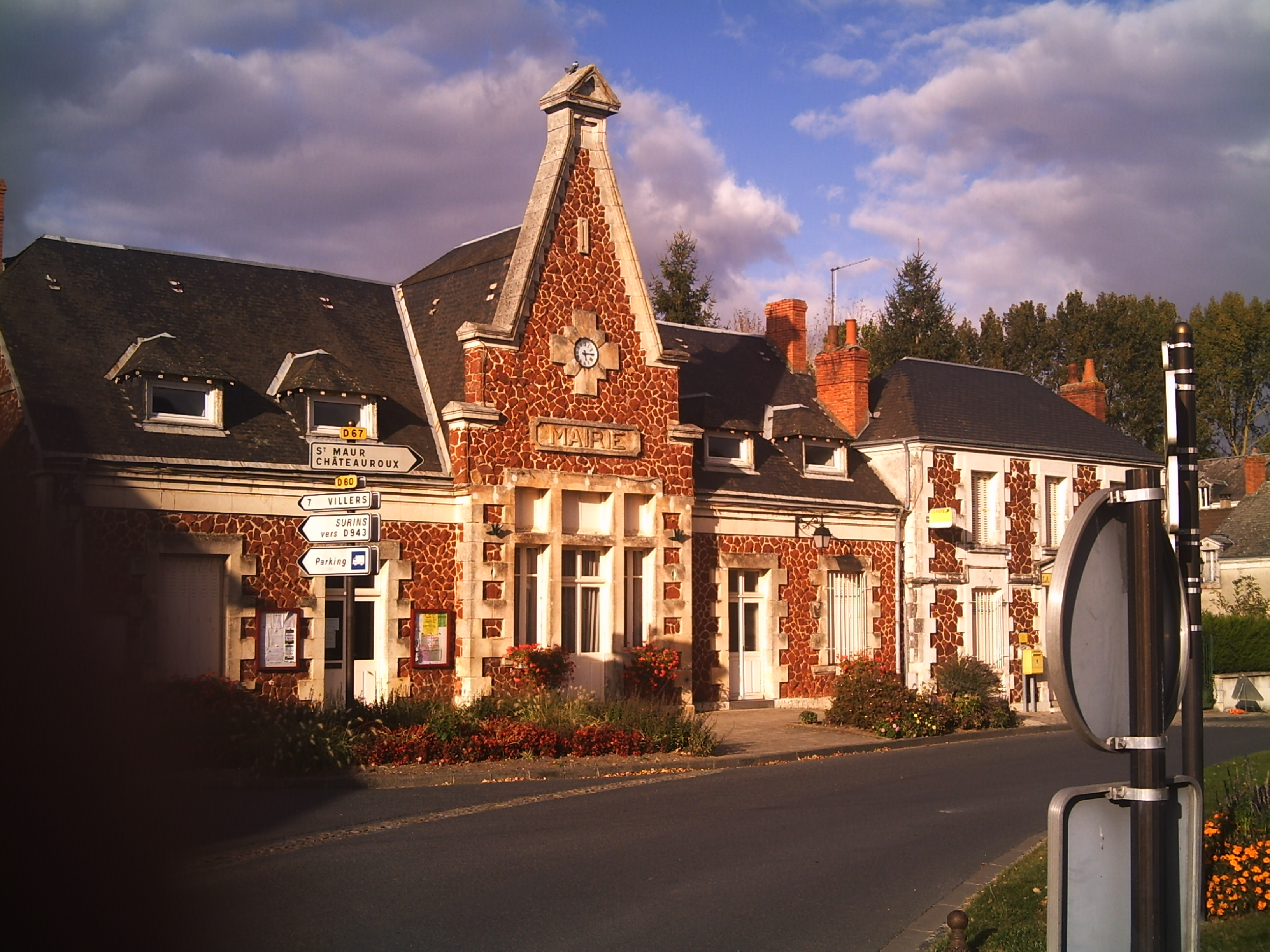 La mairie de Niherne